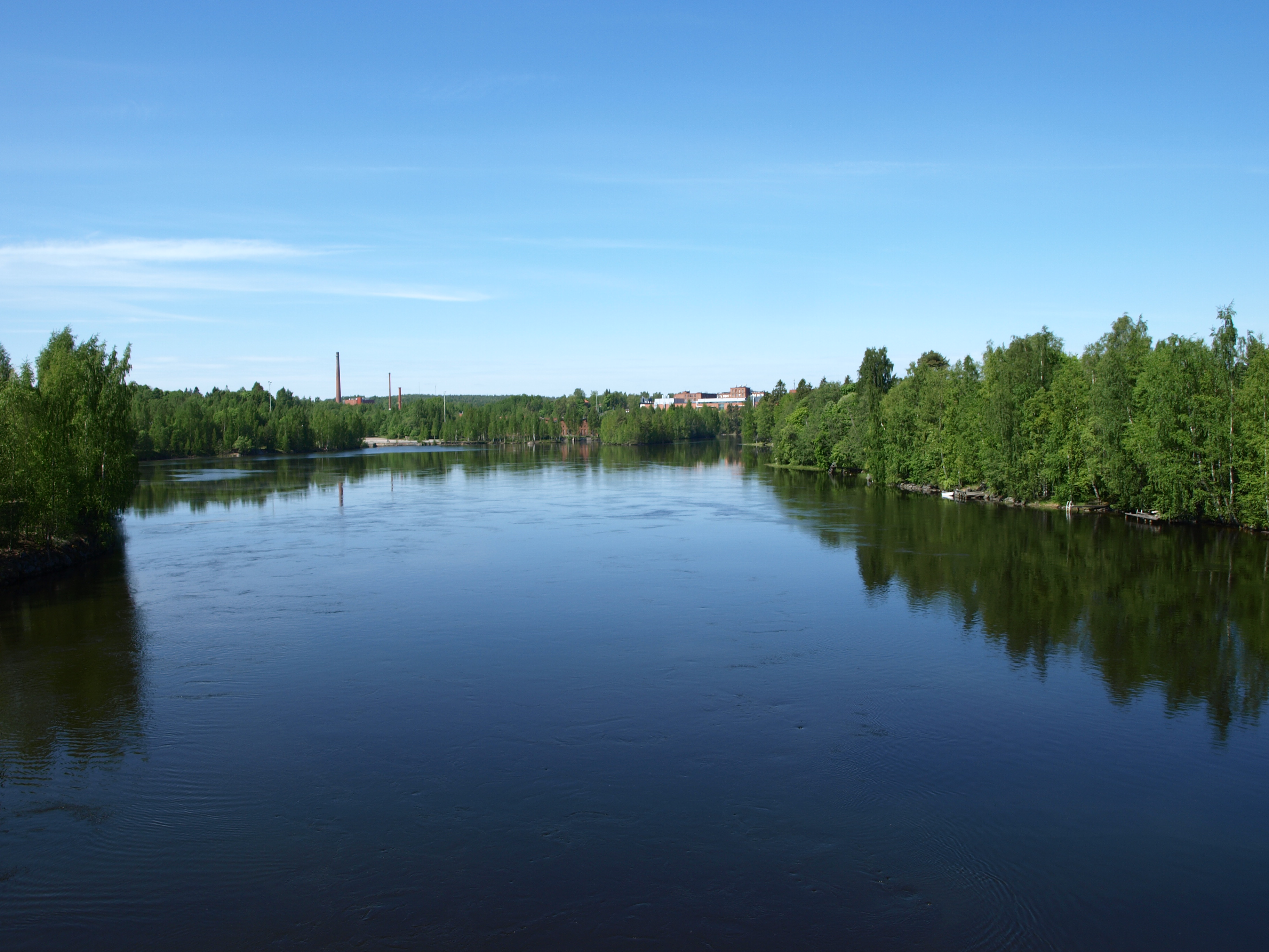 Nokianvirta alajuoksulle päin kuvattuna Nokianvirran sillalta